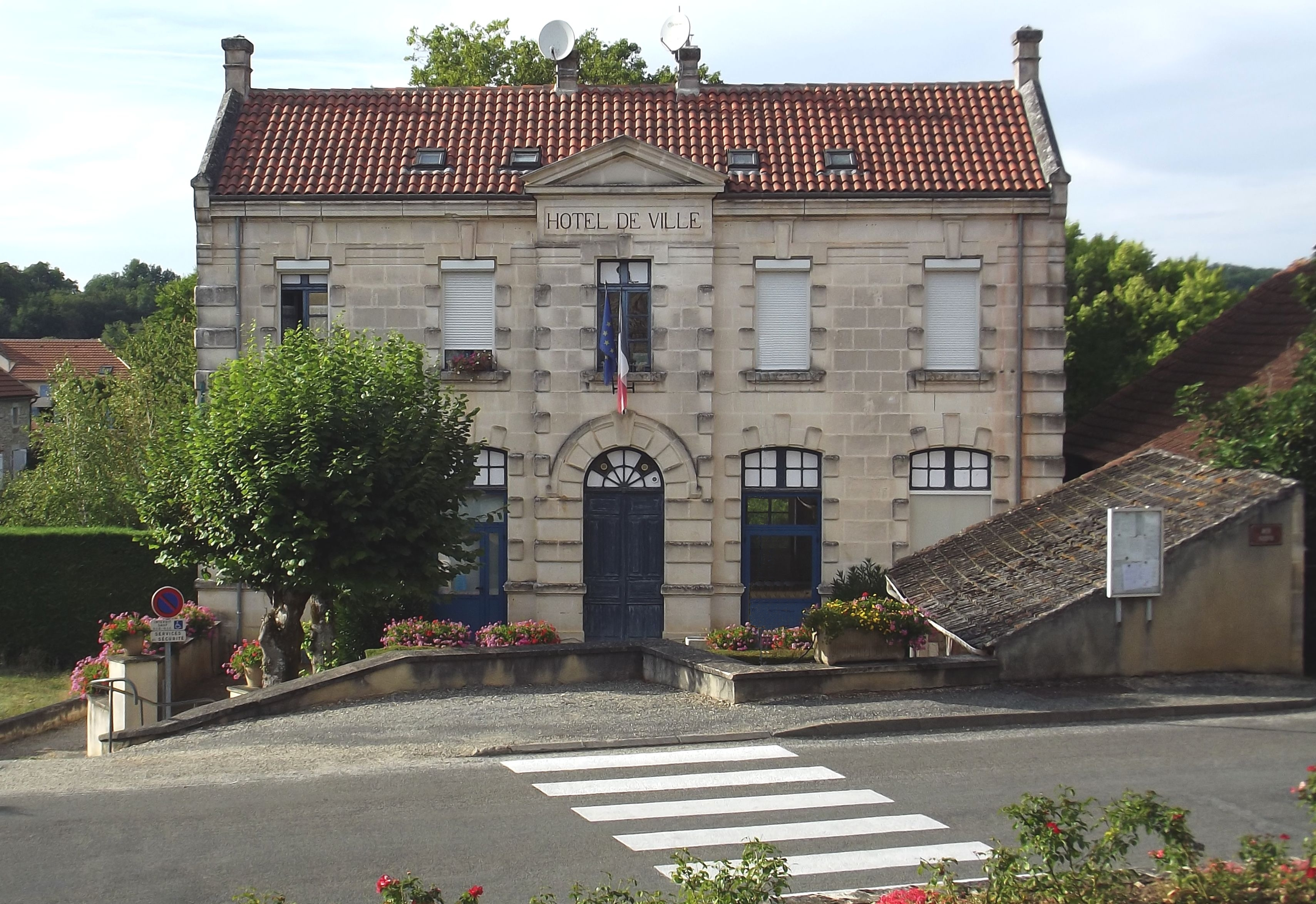 Mairie